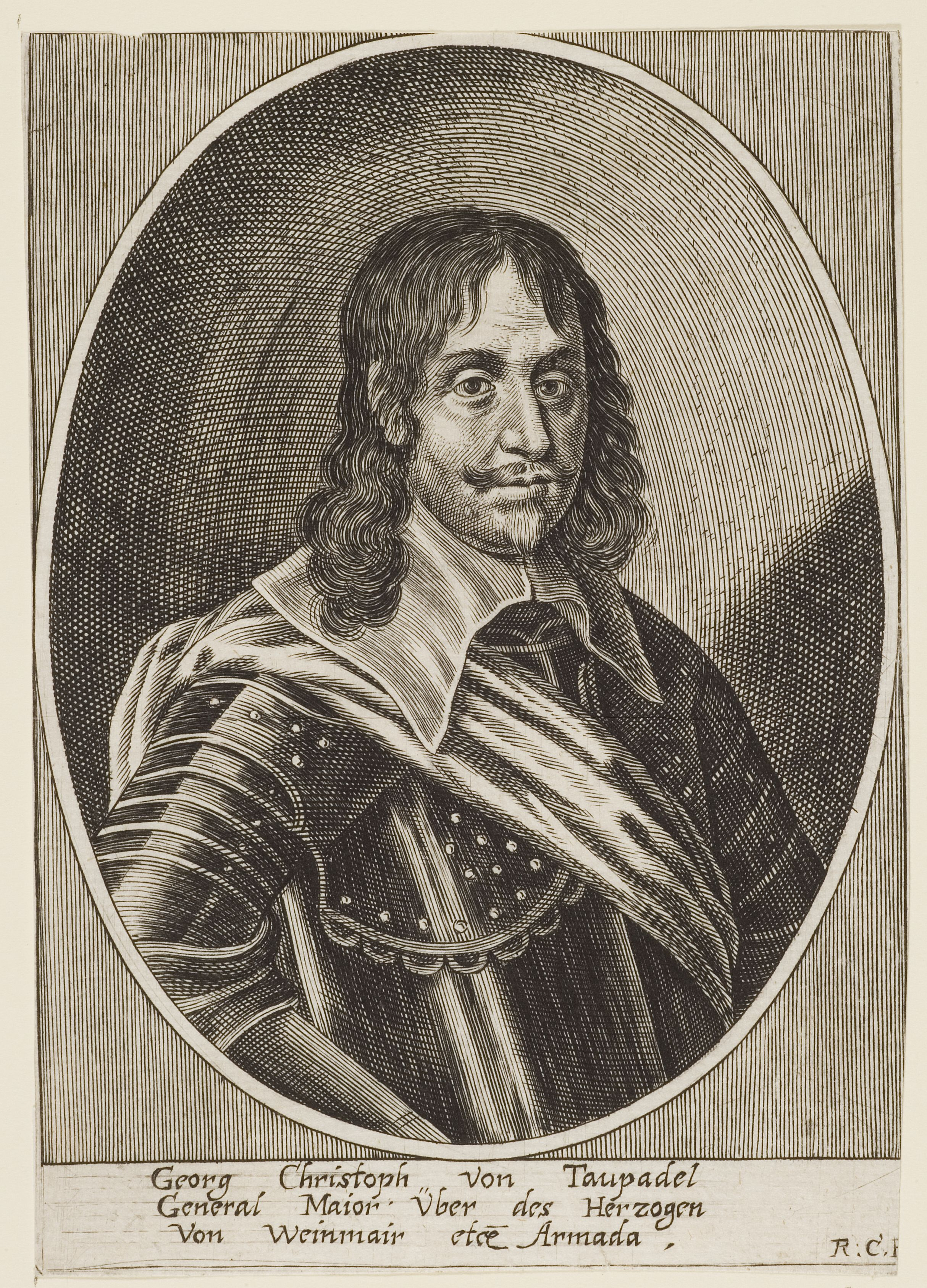 Georg Christoph von Taupadel (* um 1600 in Fichtenberg; † 12. März 1647 in Blotzheim) Kupferstich, Blatt: 146 x 101